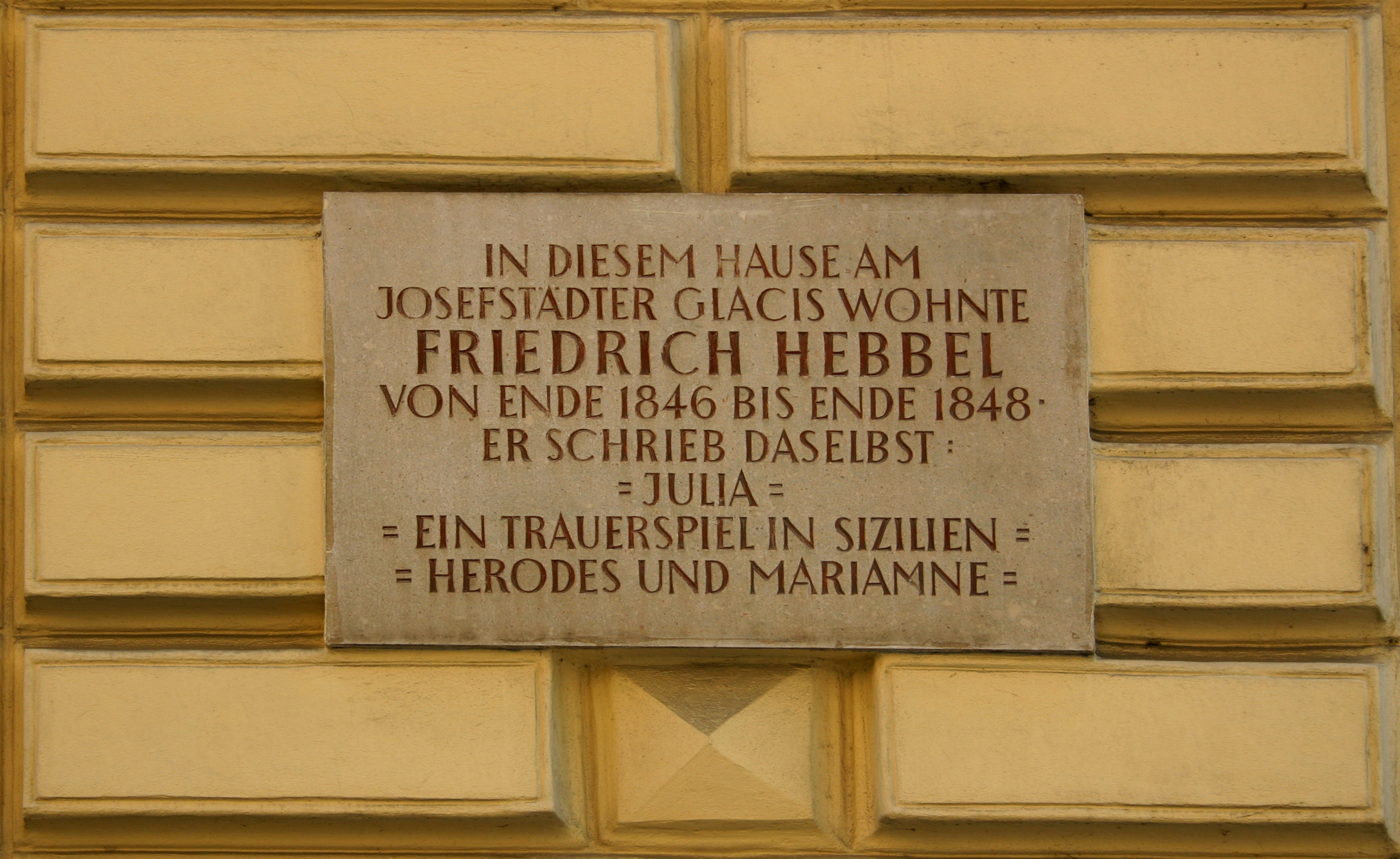 Josefstadt in Wien